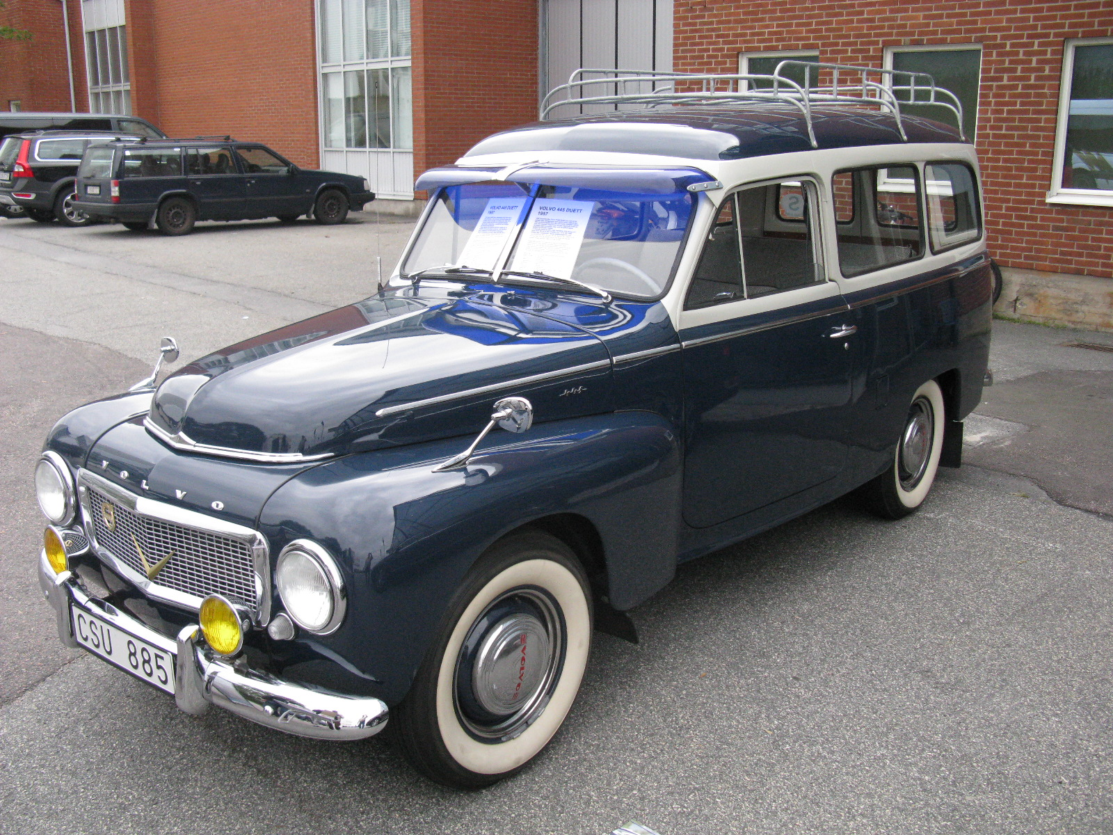 Volvo Duett